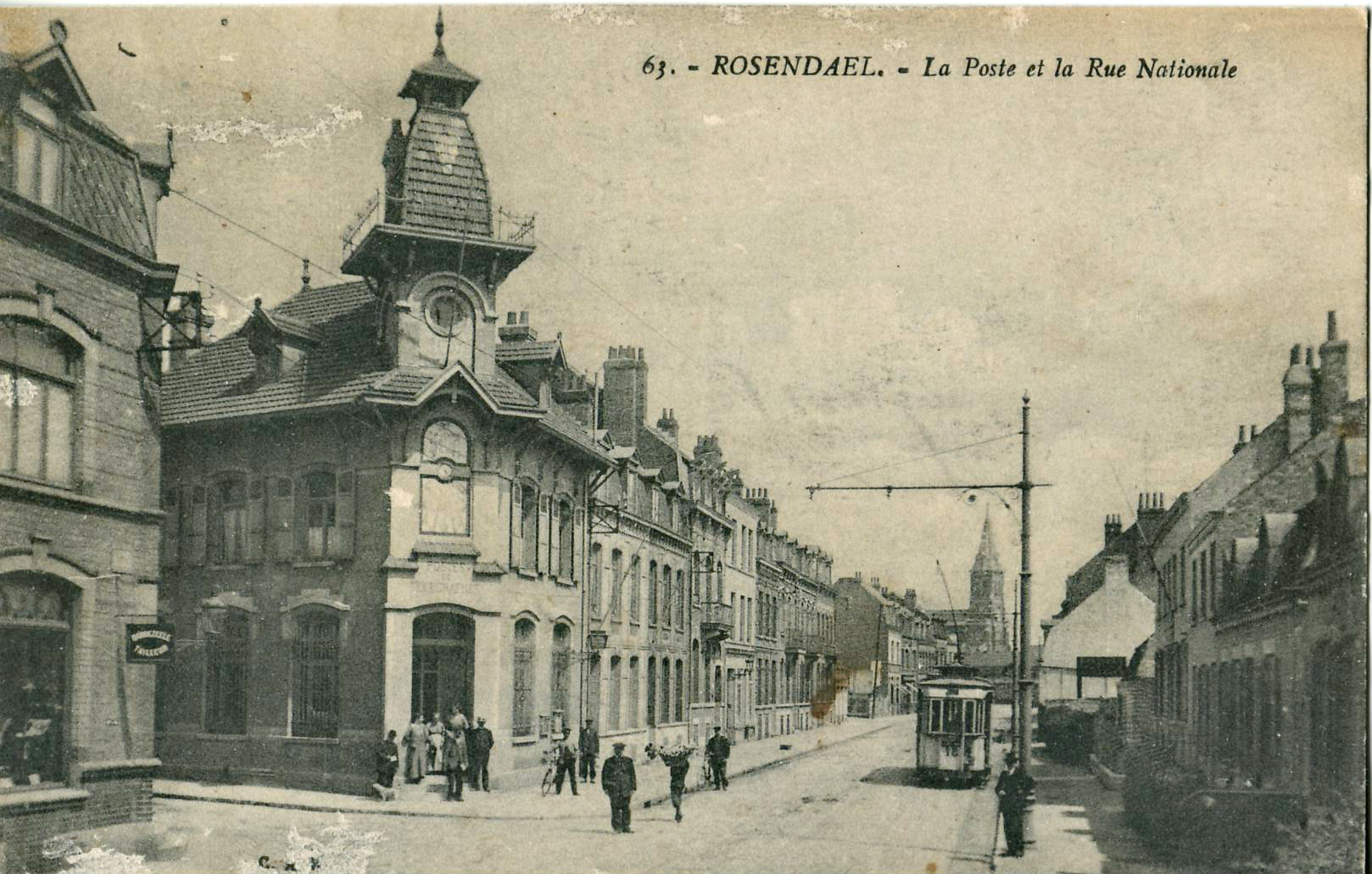 Carte postale ancienne, sans mention d'éditeur : ROSENDAËL - La Poste et la Rue nationale